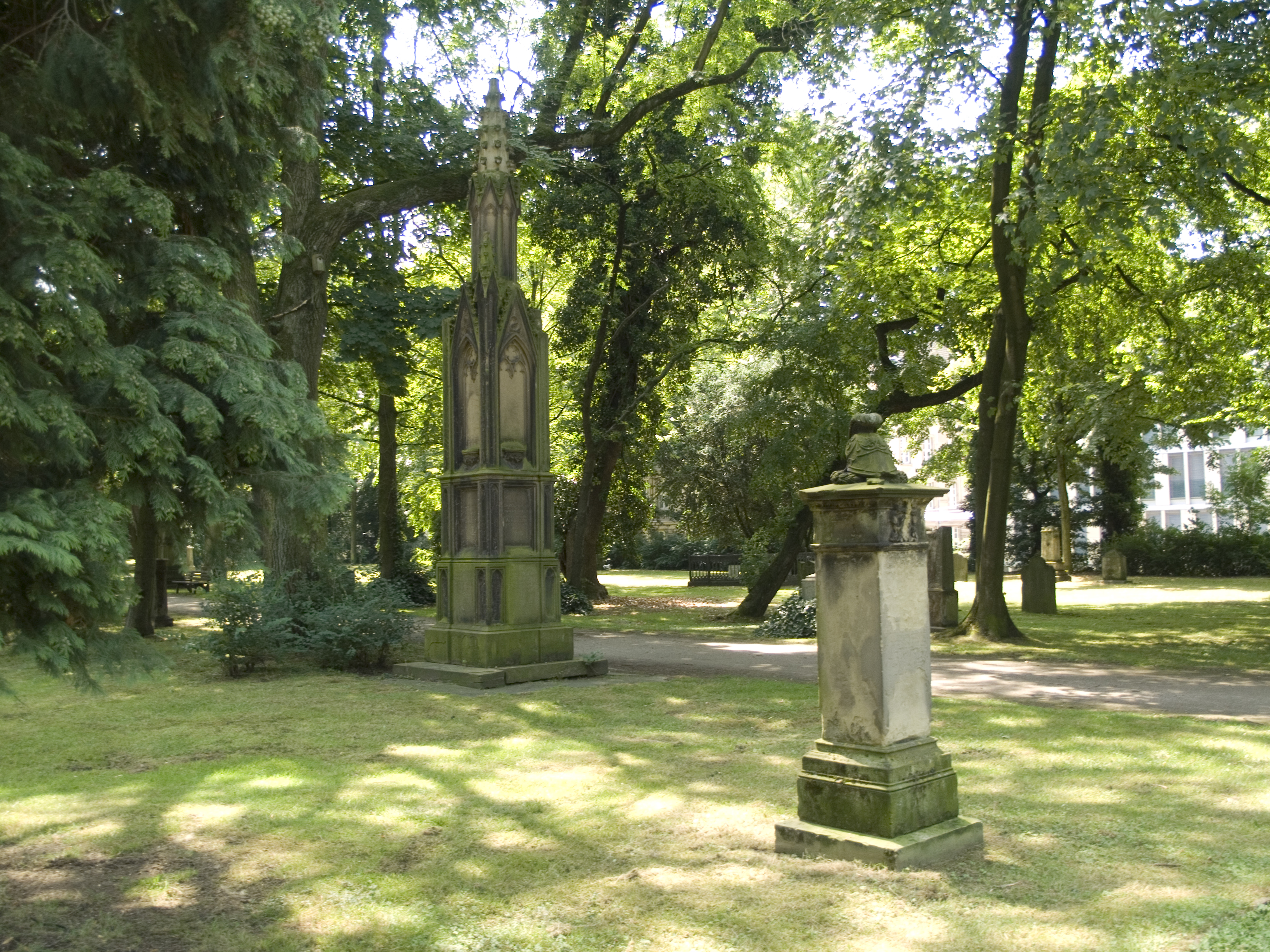 Северный Рейн - Вестфалия, Дюссельдорф. Golzheimer Friedhof, Südteil